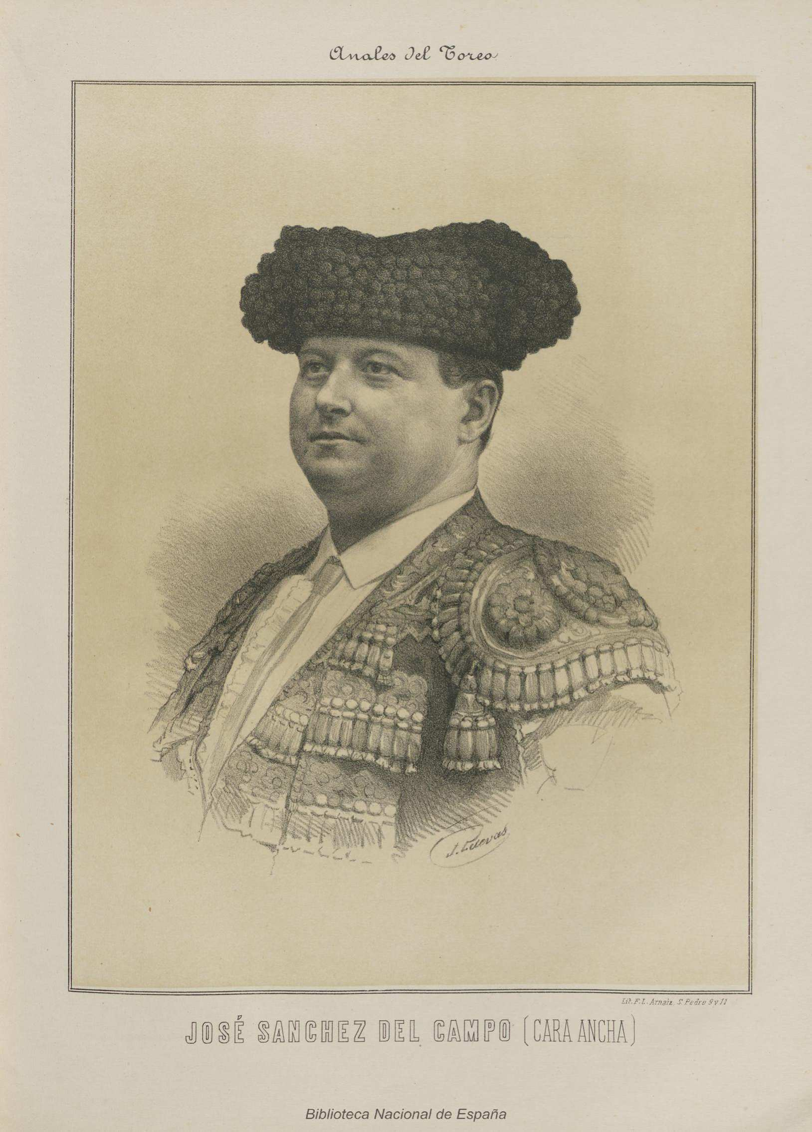 José Sánchez del Campo, Cara Ancha, litografía de J. Cuevas. ilustración de Anales del toreo : reseña histórica de la lidia de reses bravas : galería biográfica de los principales lidiadores: razón de las primeras ganaderías españolas, sus condiciones y divisas obra escrita por José Velázquez y Sánchez; e ilustrada por reputados artistas, Madrid, 1888.